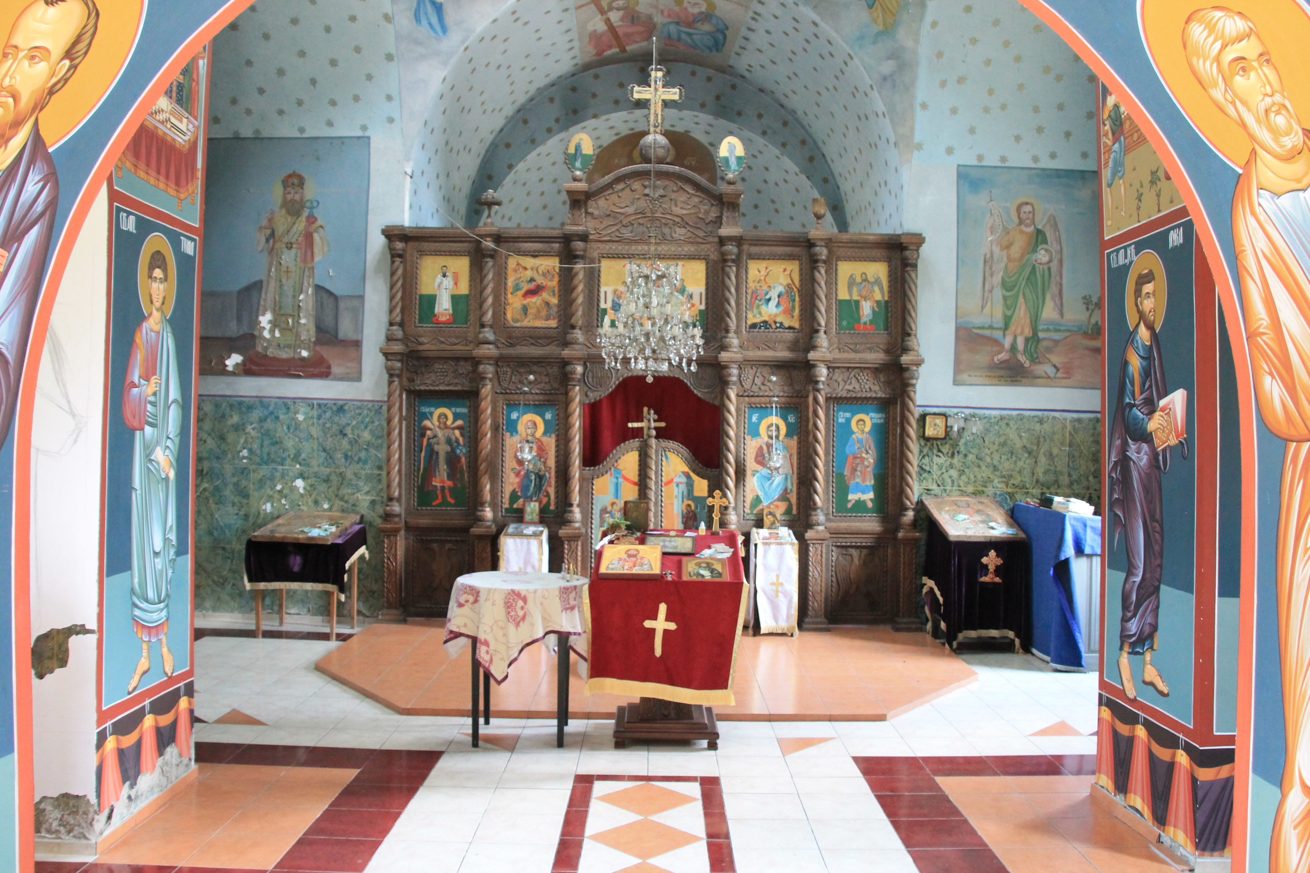 Crkva Sv. Save (Jarmenovci)